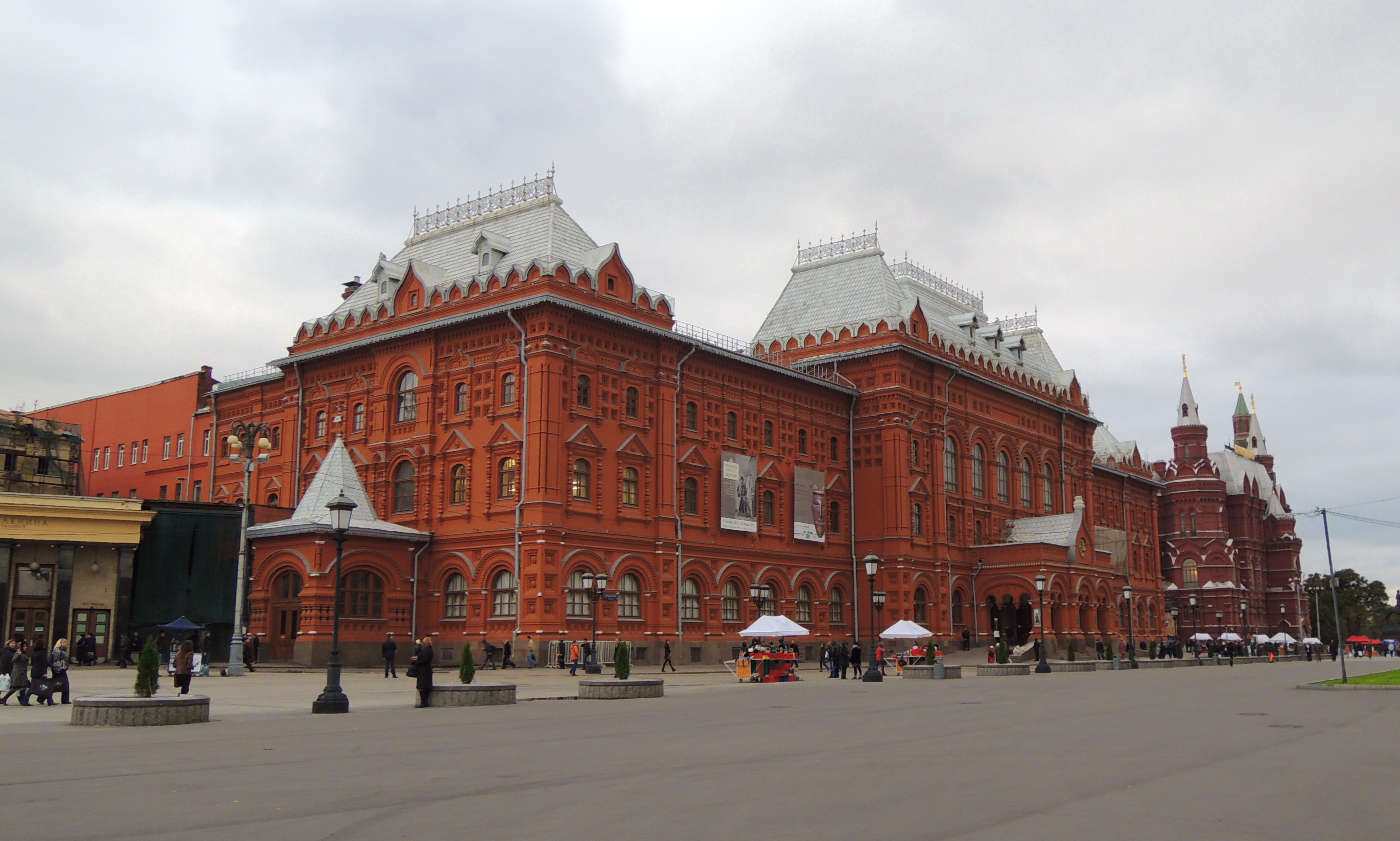 Здание городской думы (Москва)